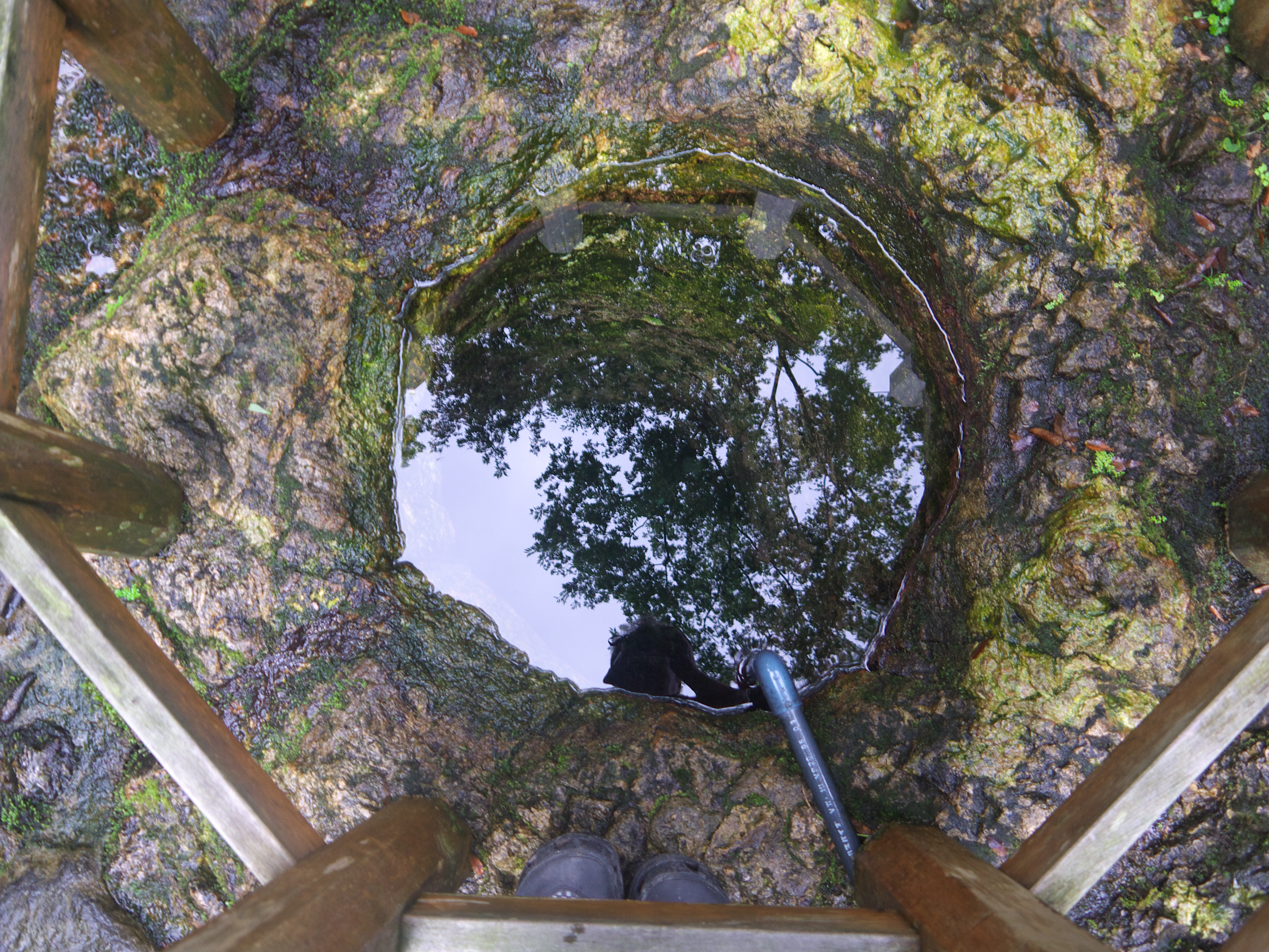 手取川甌穴弘法池